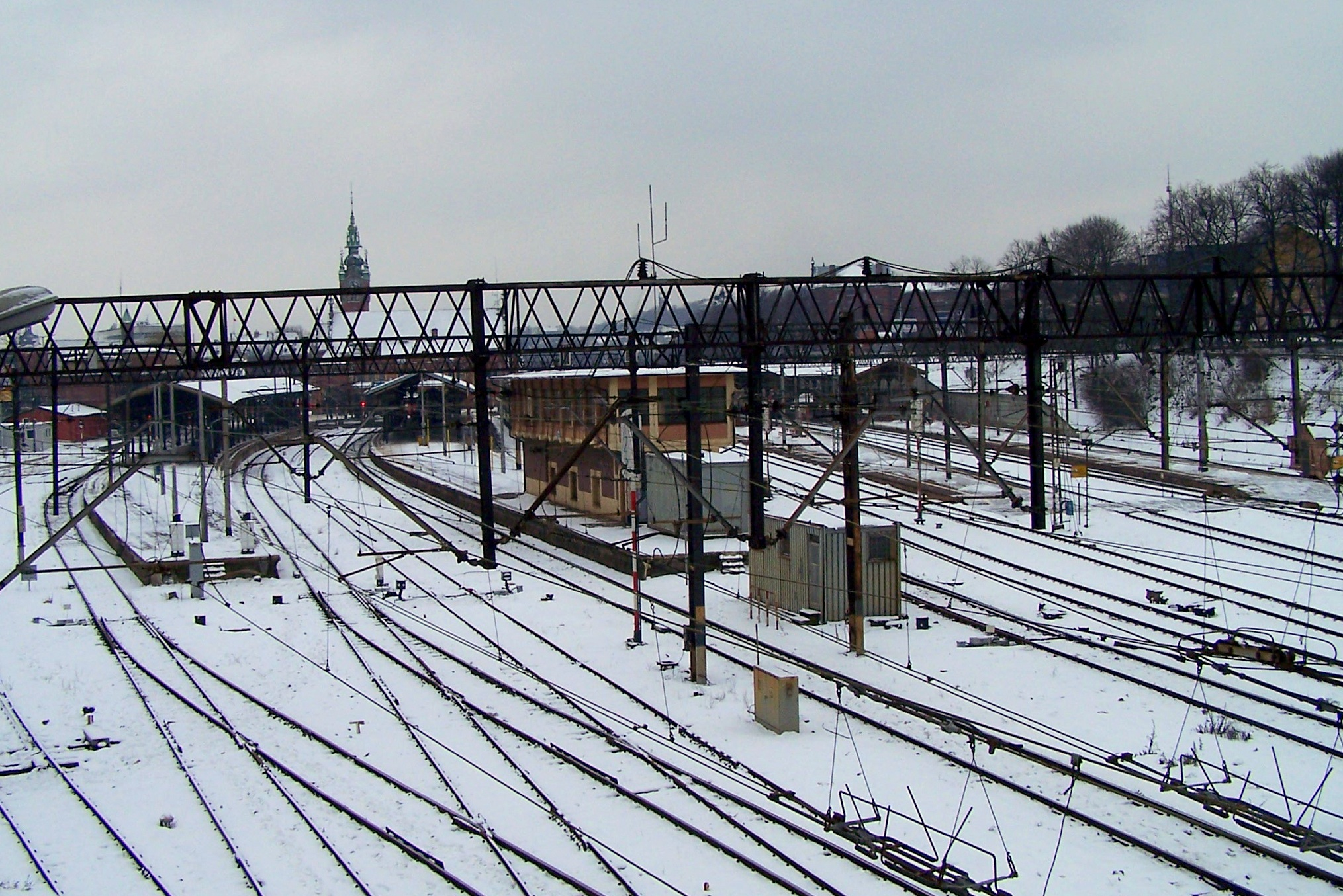 perony w Gdańsku Głównym